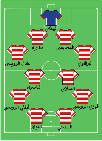 اصطفاف لاعبو النادي الإفريقي لِكُرة القدم في مُباراتهم ضد نادي أستون ڤيلا (6-2 / 1-1)، 1991